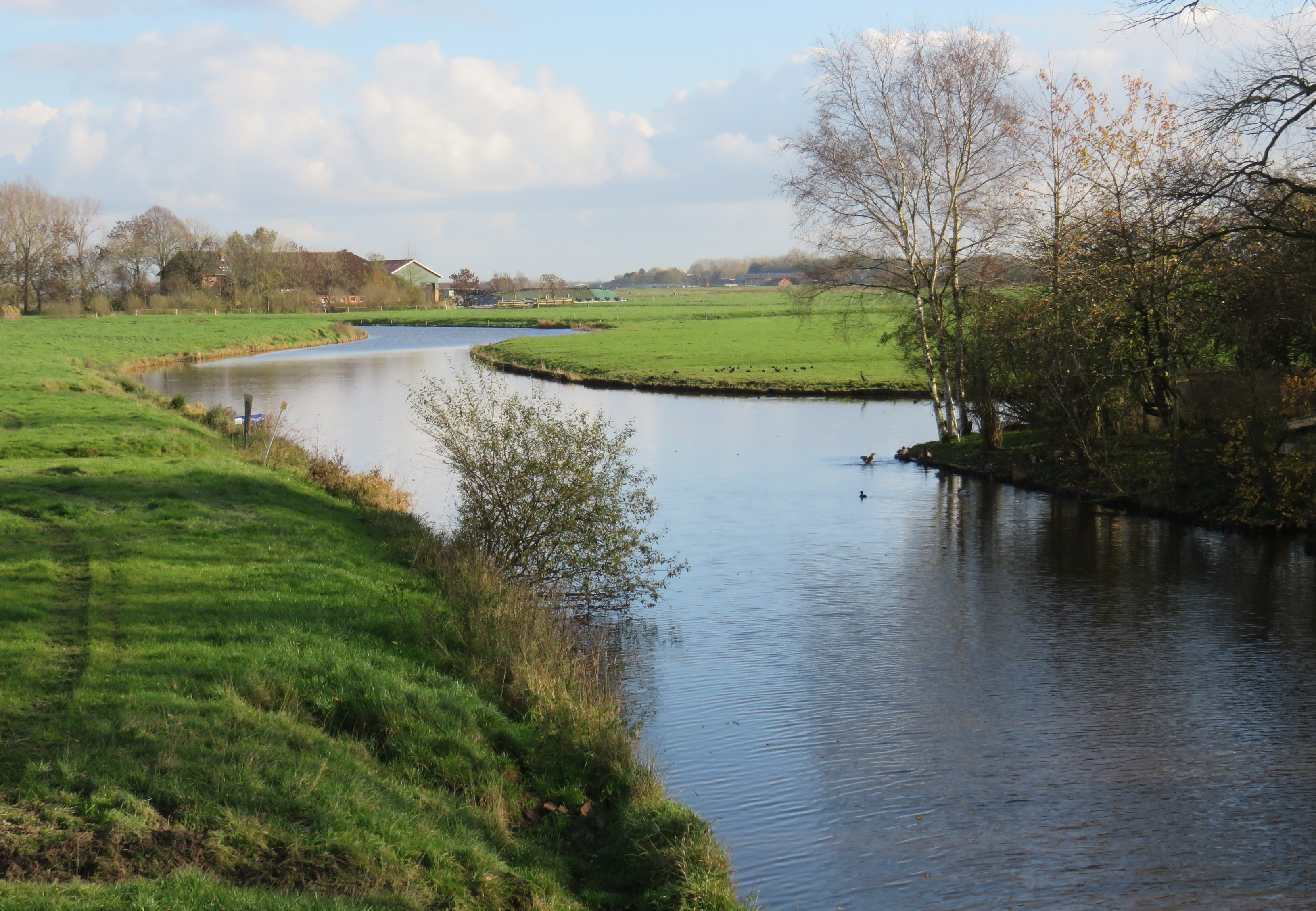 Blick von der Brücke Auricher Landstraße auf das Fehntjer Tief und die Abzweigung zum Oldersumer Tief